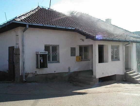 Poštata vo Dragobrašte